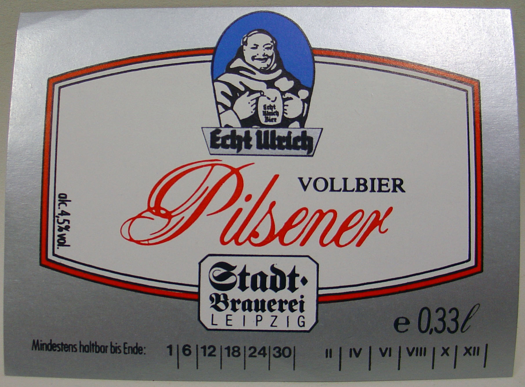 Stadt-Brauerei Leipzig, Echt Ulrich Pilsener Etikett